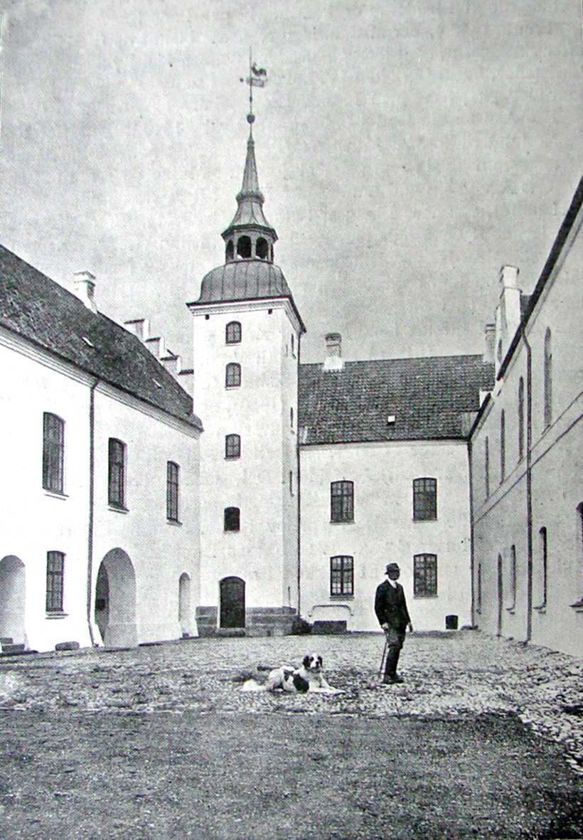 Kokkedal Slot i Torslev Sogn, (Øster Han Herred, Hjørring Amt) er en nordjydsk herregård, og dens historie går helt tilbage til middelalderen.